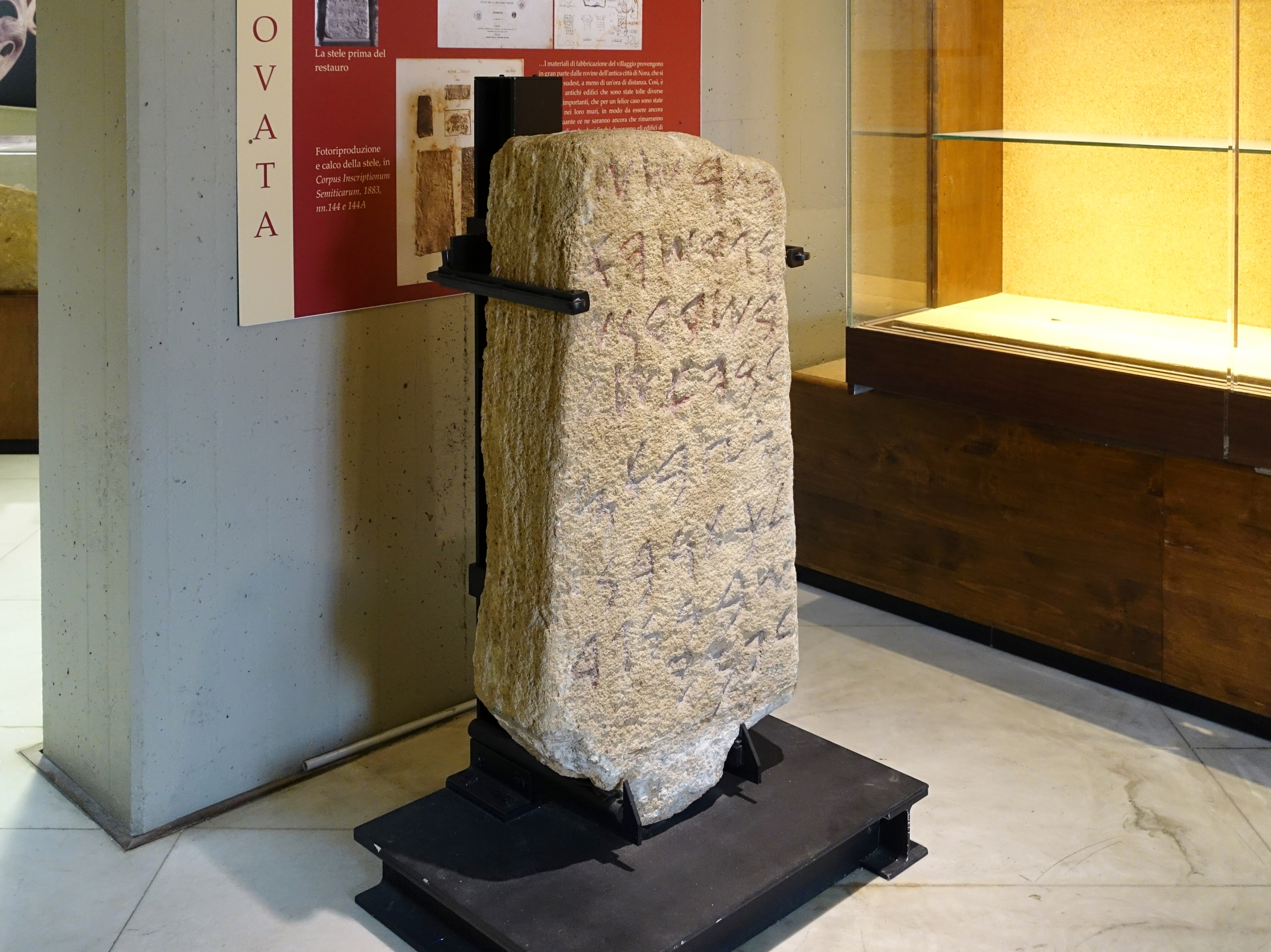 Stele von Nora, Gemeinde Pula, Archäologisches Nationalmuseum Cagliari, Sardinien, Italien